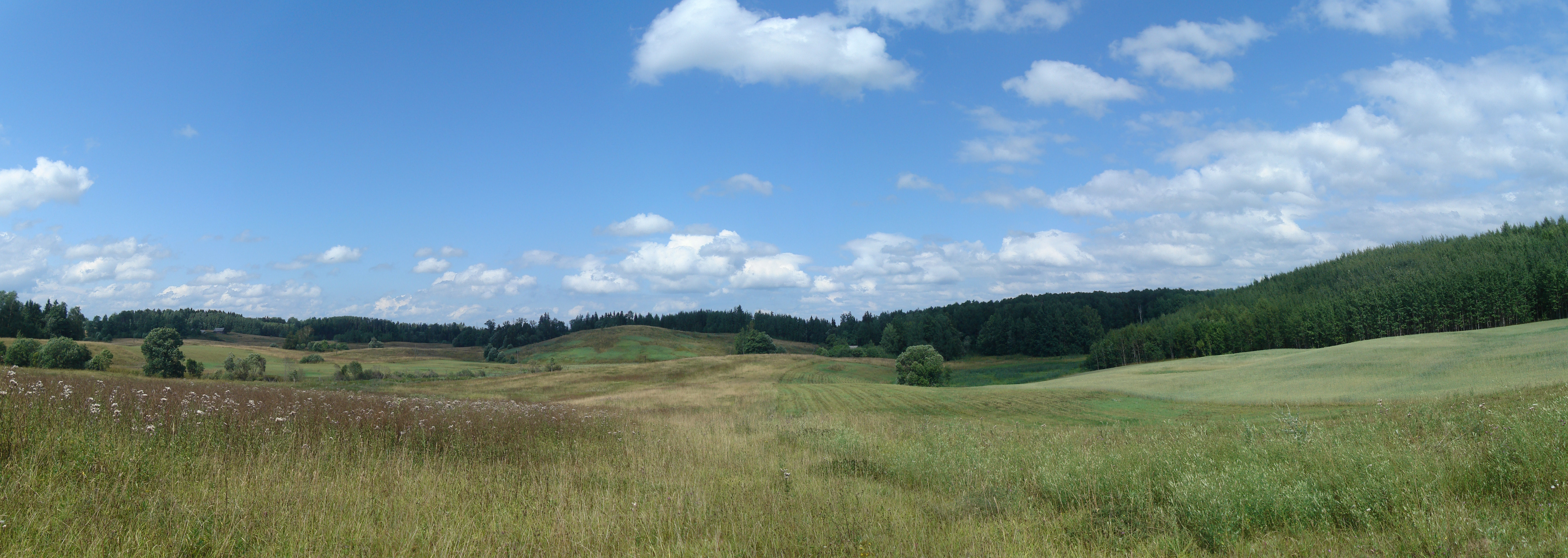 lauku panorāma netālu no Sauleskalna